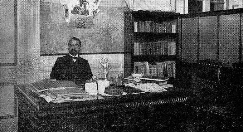 Manuel Castro López, director de El Eco de Galicia, fotografía en Vida Gallega 1910